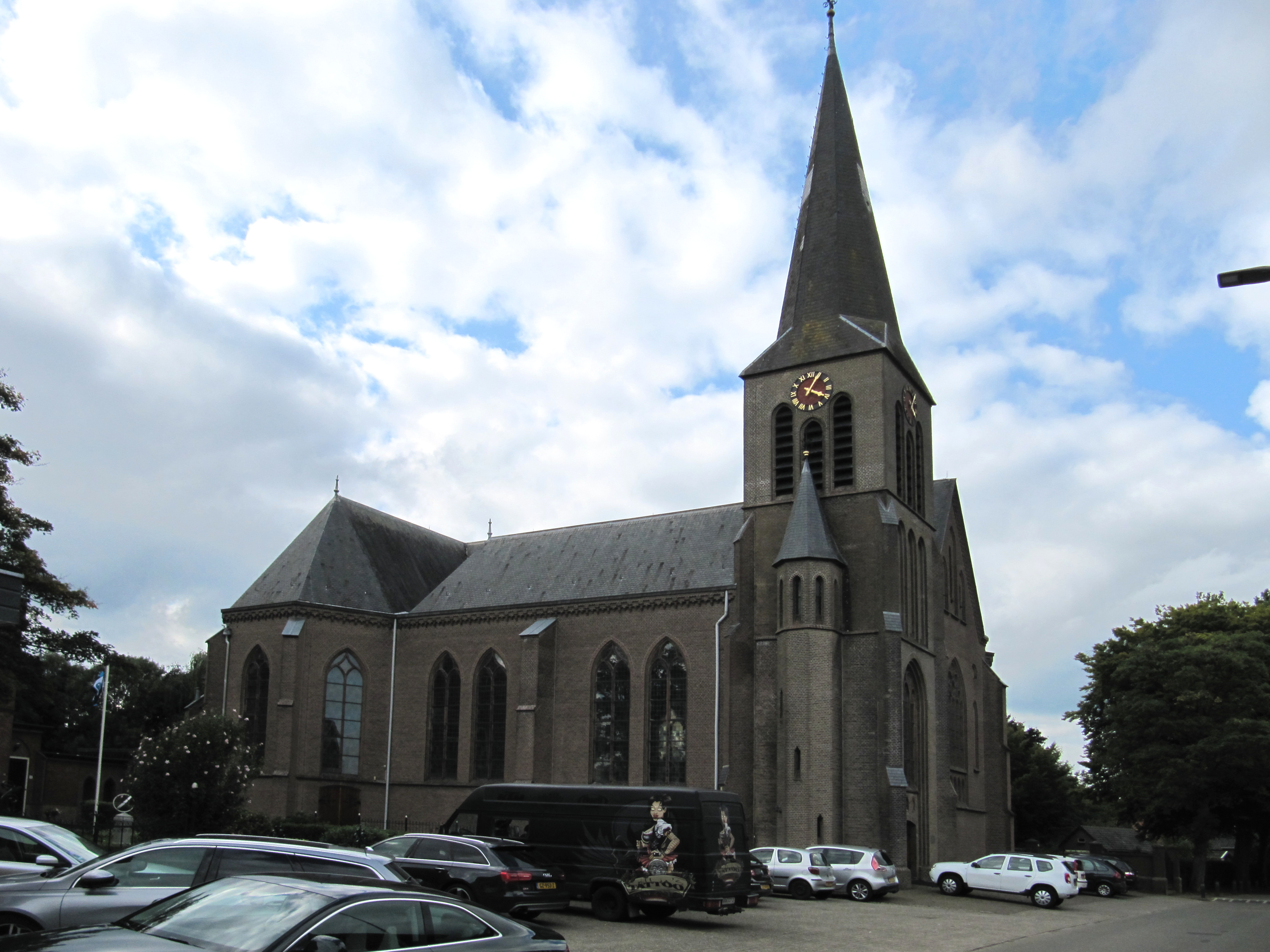 Martinuskerk, Kerkstraat 70 -72 Gaanderen